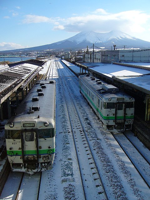 森駅 (北海道)構内跨線橋からja:北海道駒ヶ岳を望む 2005年12月15日 Bakkai撮影